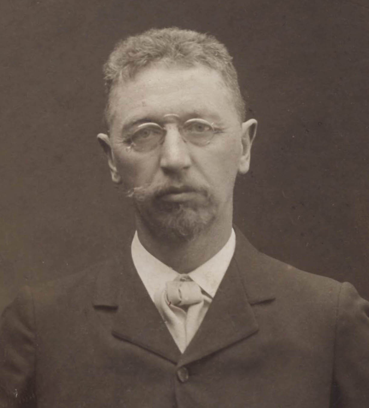 Kunstmaler C. N. Overgaard